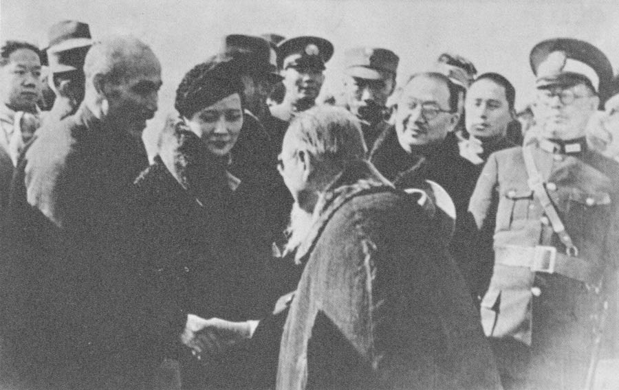 西安事变后，蒋介石和宋美龄返回南京，由国民政府主席林森接机